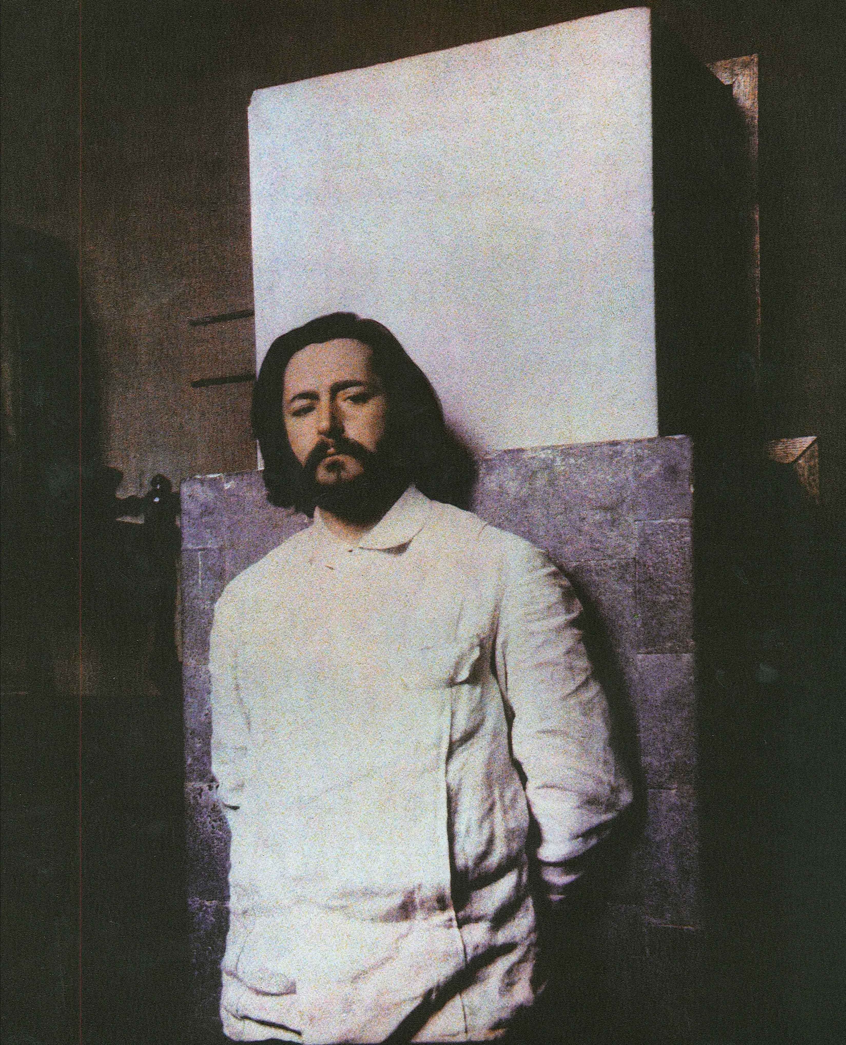 Леонид Николаевич Андреев. Автопортрет в автохроме.